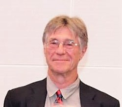 Verleihung des Ordem de Timor-Leste, 30. August 2014. Gil Scrine